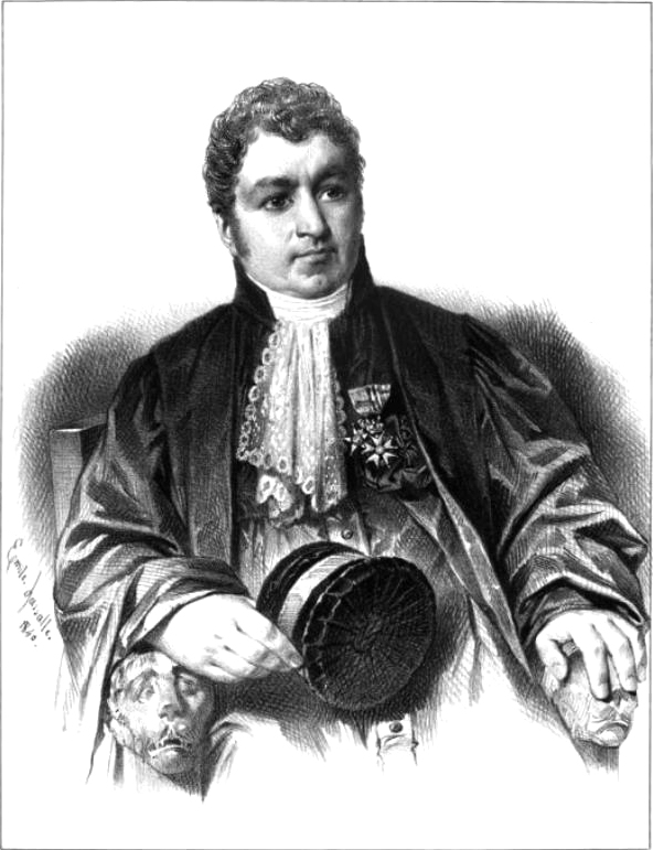 A. du Sommeard gravure par Lassalle. Alexandre Du Sommerard (1779-1842), French archaeologist